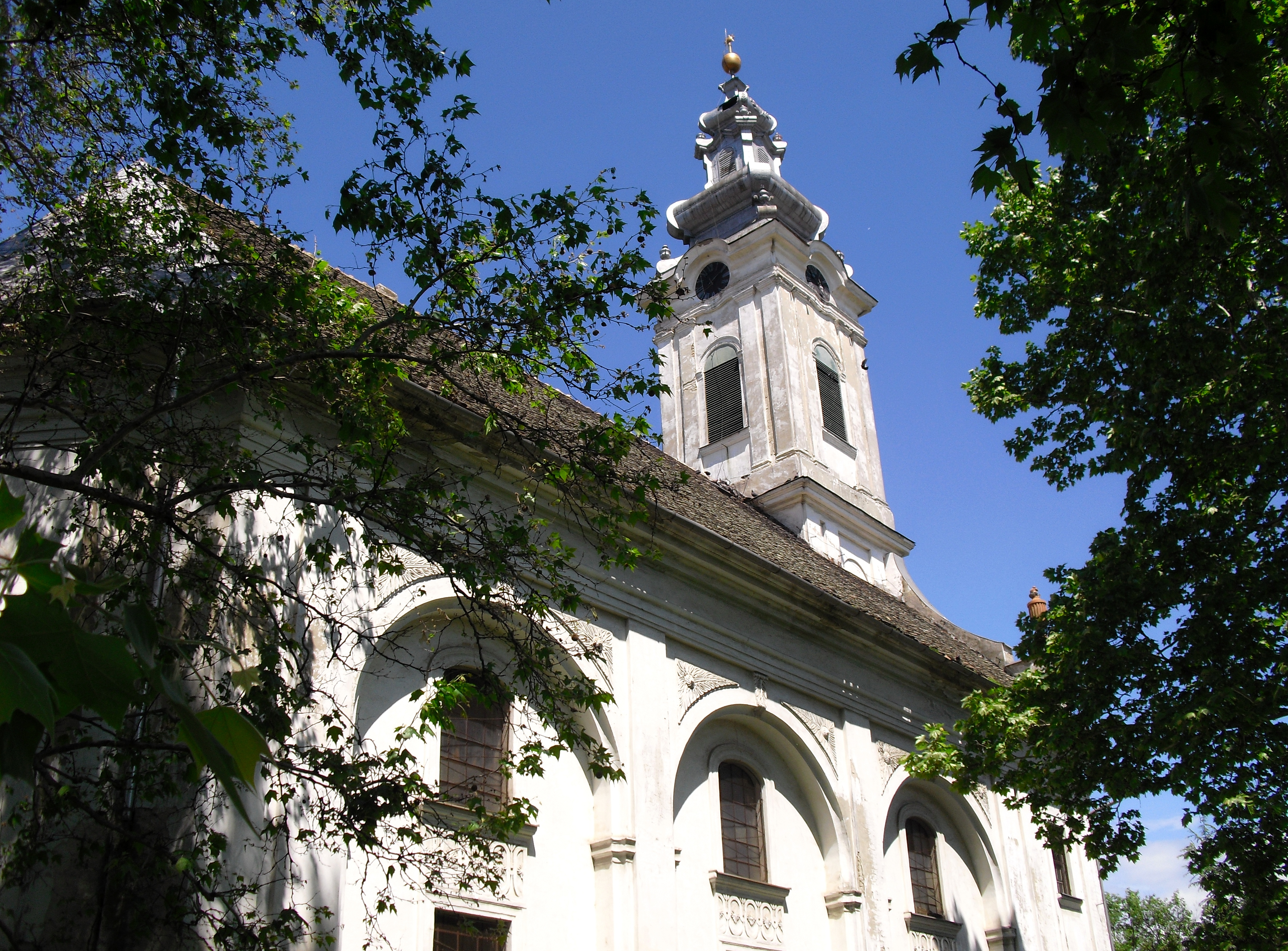 Реформаторска (Калвинистичка) црква у Врбас...